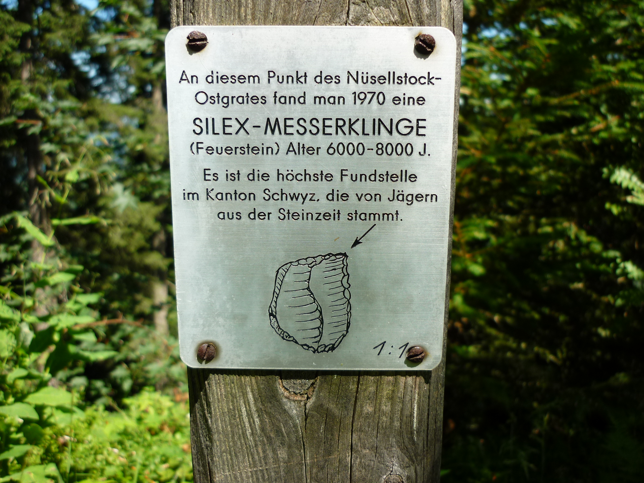 Nüsellstock, Rothenthurm SZ, Schweiz